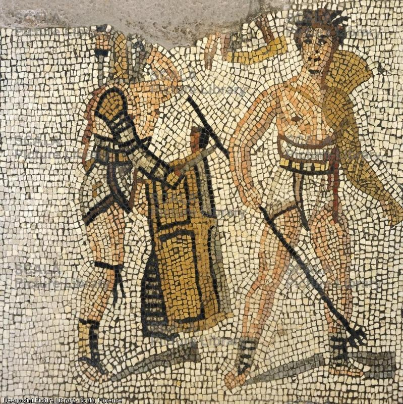 Mosaico dell'epoca romana trovato a Negrar (Valpolicella) e oggi conservato nel museo del Teatro Romano di Verona